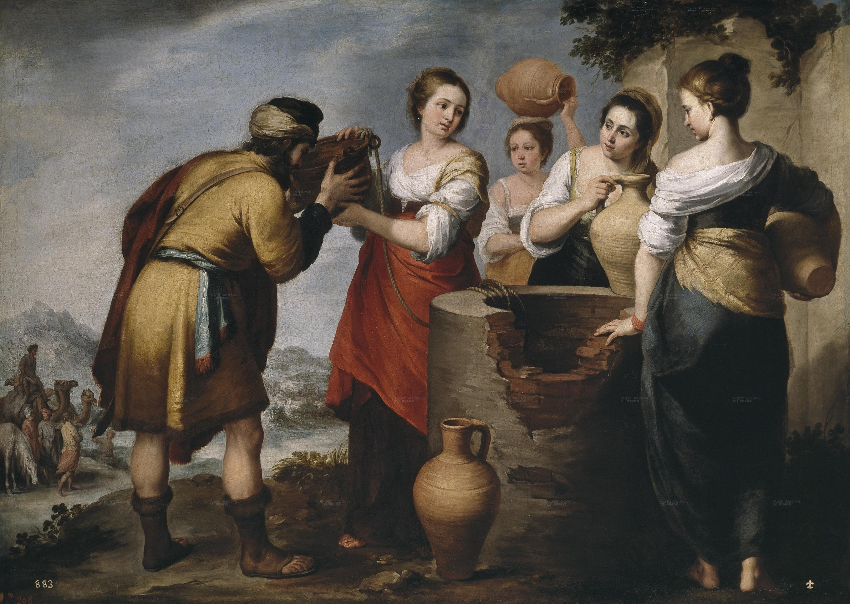 La obra representa a Rebeca, futura esposa del patriarca hebreo Isaac, conversando con Eliezer, que era un criado de su futuro suegro Abraham, junto al pozo.